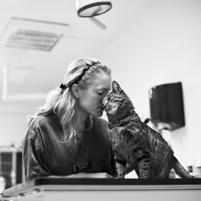 Kissan rokotuspäivä